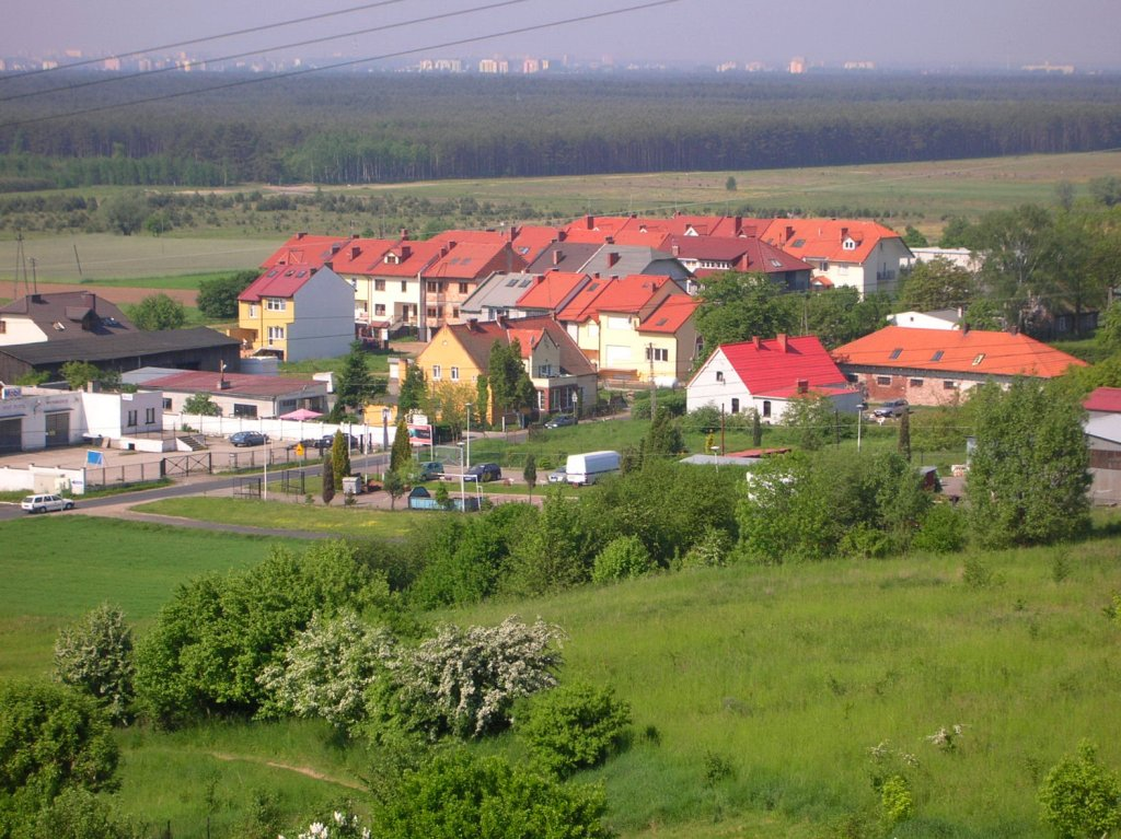 Widok os. Eskulapa ze Zbocza Fordońskiego